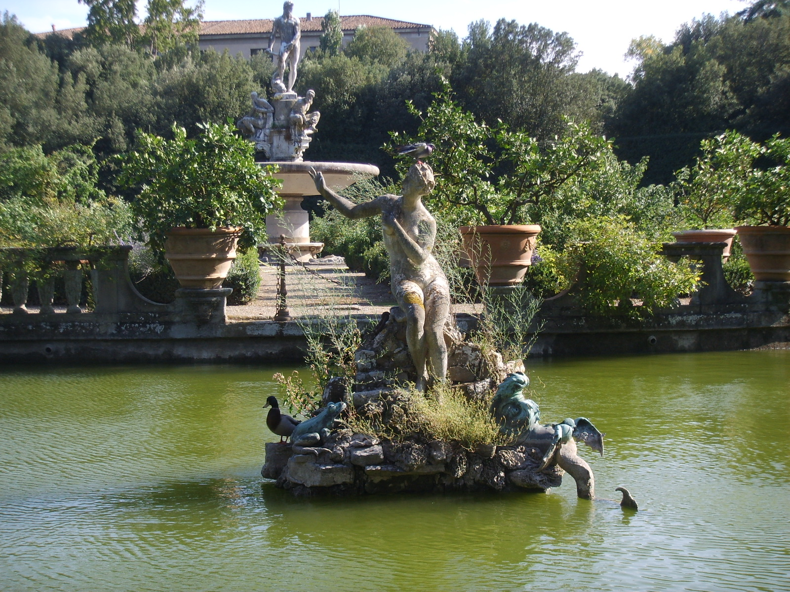 Giovanni Battista Pierratti (Italien, 1599-1662): Andromède et le monstre, entre 1630 et 1662, Il Vasca dell'isola, Jardins Boboli du Palais Pitti, Florence, Italy